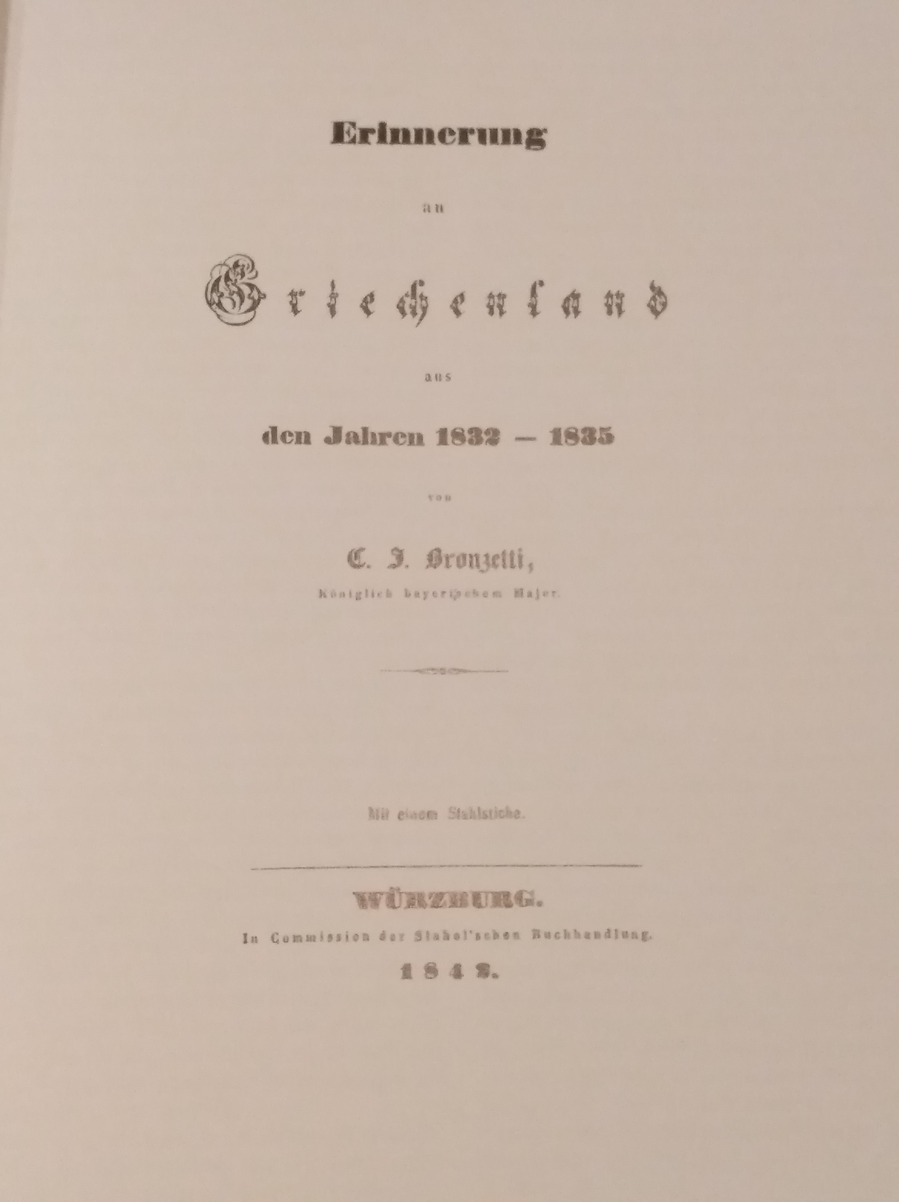 Libro: Ricordo della Grecia 1832-1835 di C. J. Bronzetti